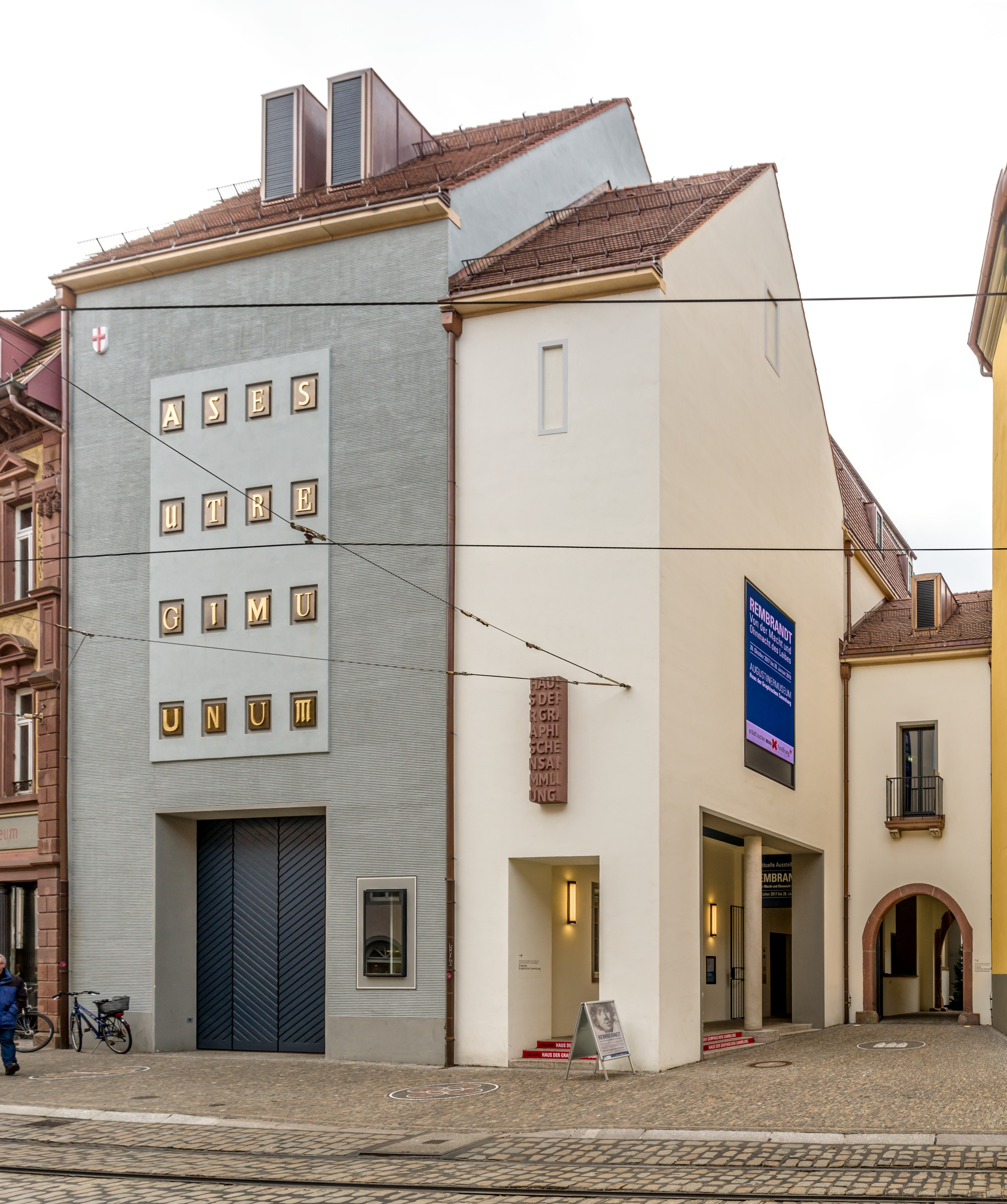 Bilder aus Freiburg